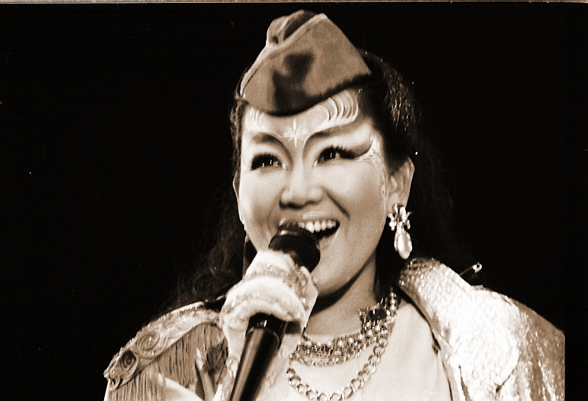 Photo prise par moi-même Mike3 en juin 1985 au Havre.